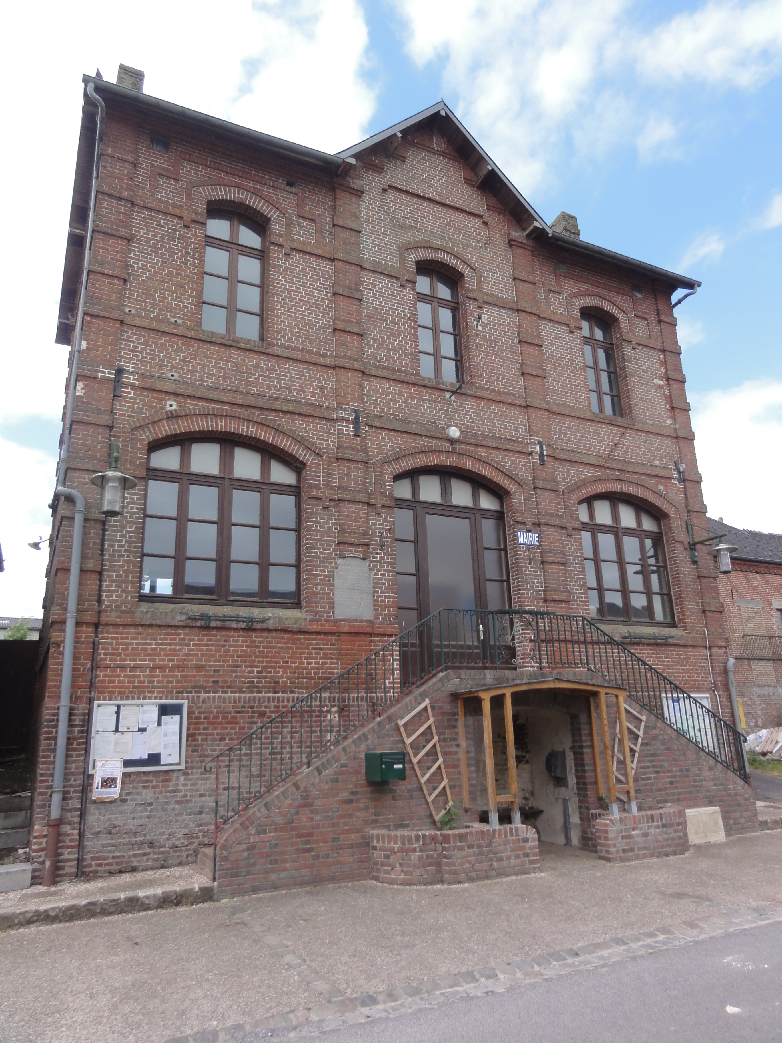 Nampcelles-la-Cour (Aisne) mairie